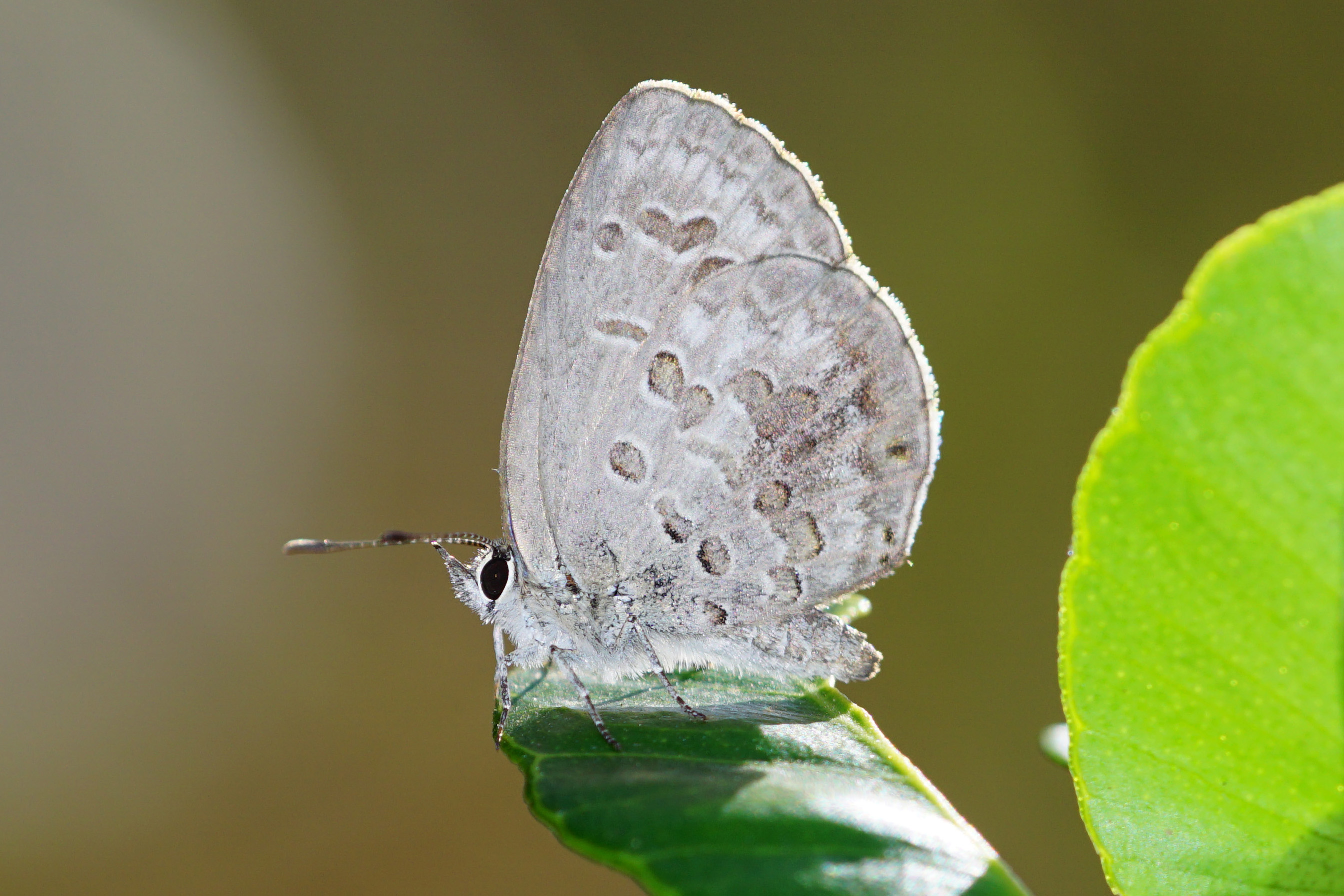 綺灰蝶 Chilades laius koshuensis